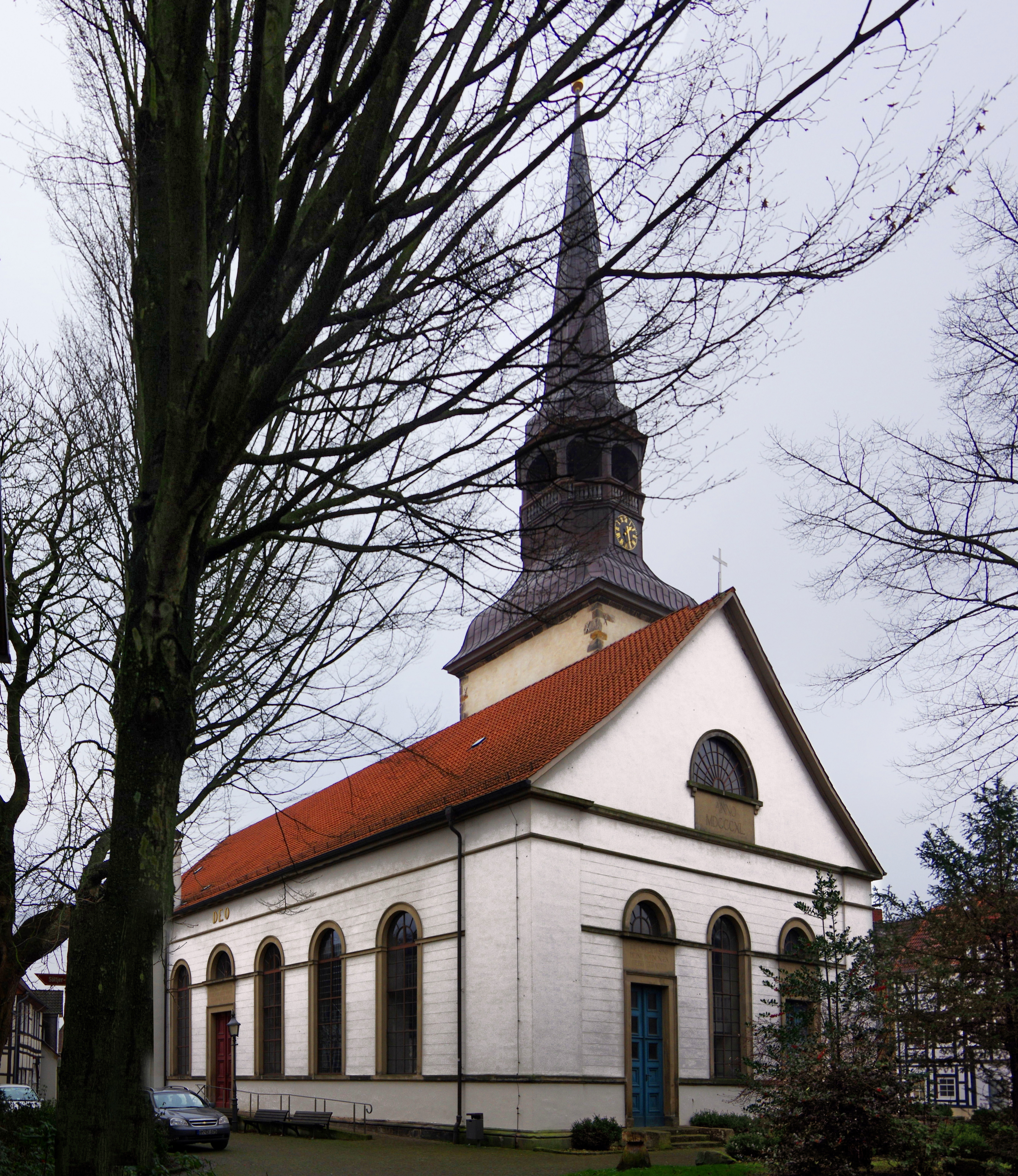 Bad Münder, ev.-luth. Kirche St. Petri und Pauli